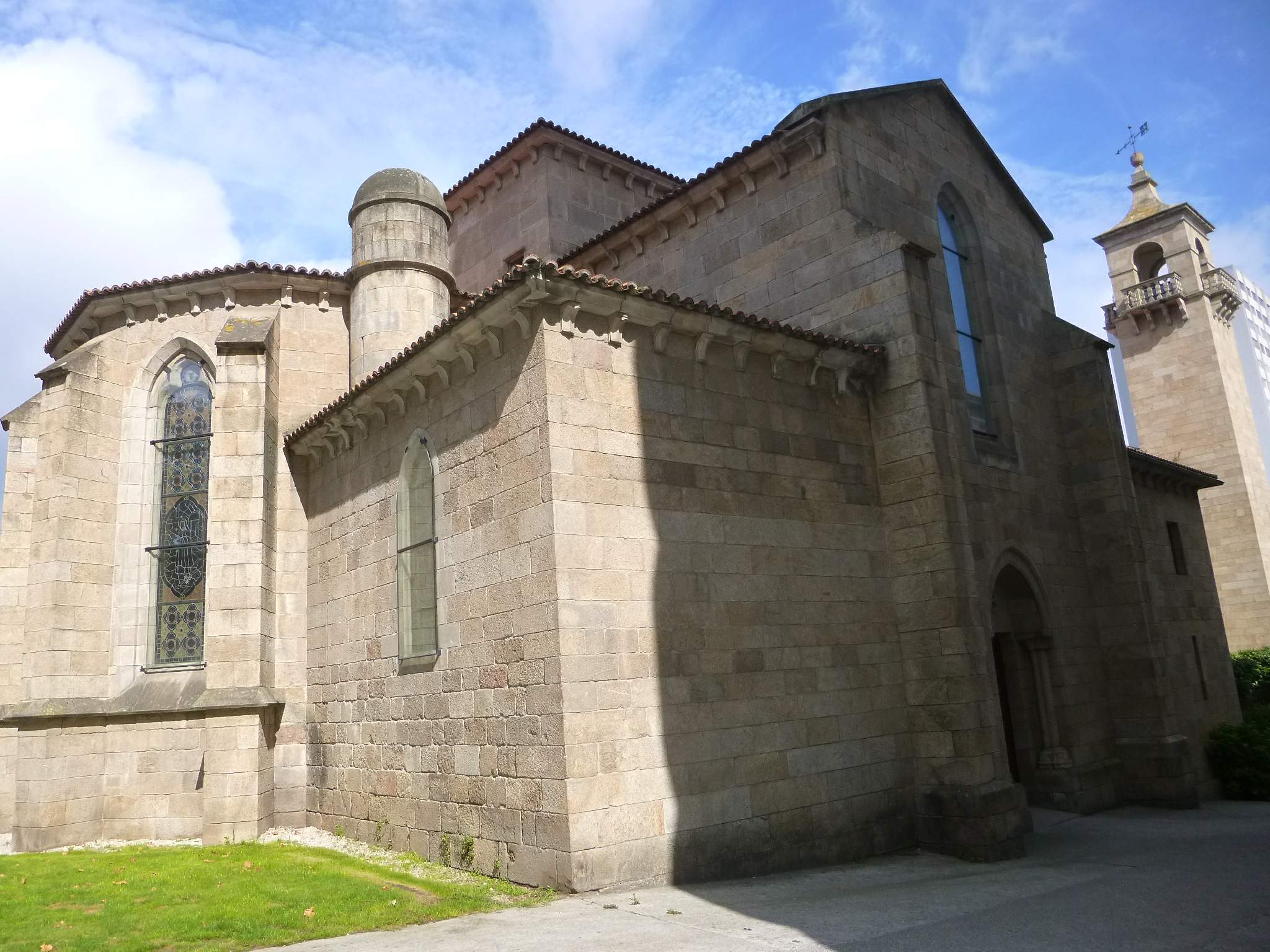 A Coruña - Iglesia de San Francisco de Asís (Franciscanos)